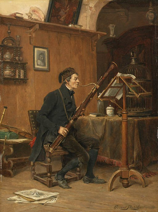 Gerard Portielje, Le joueur de basson.